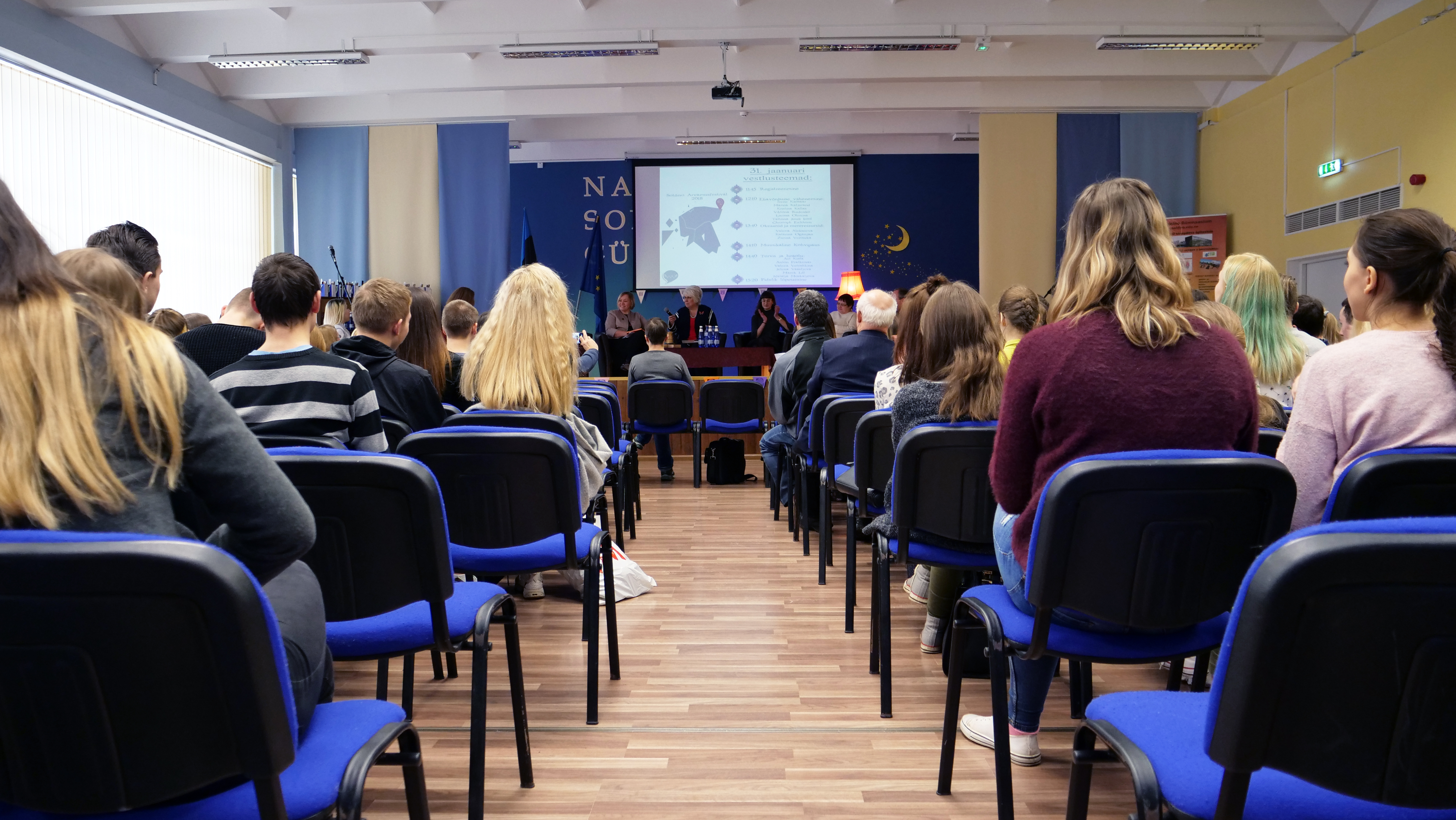 kooli aula